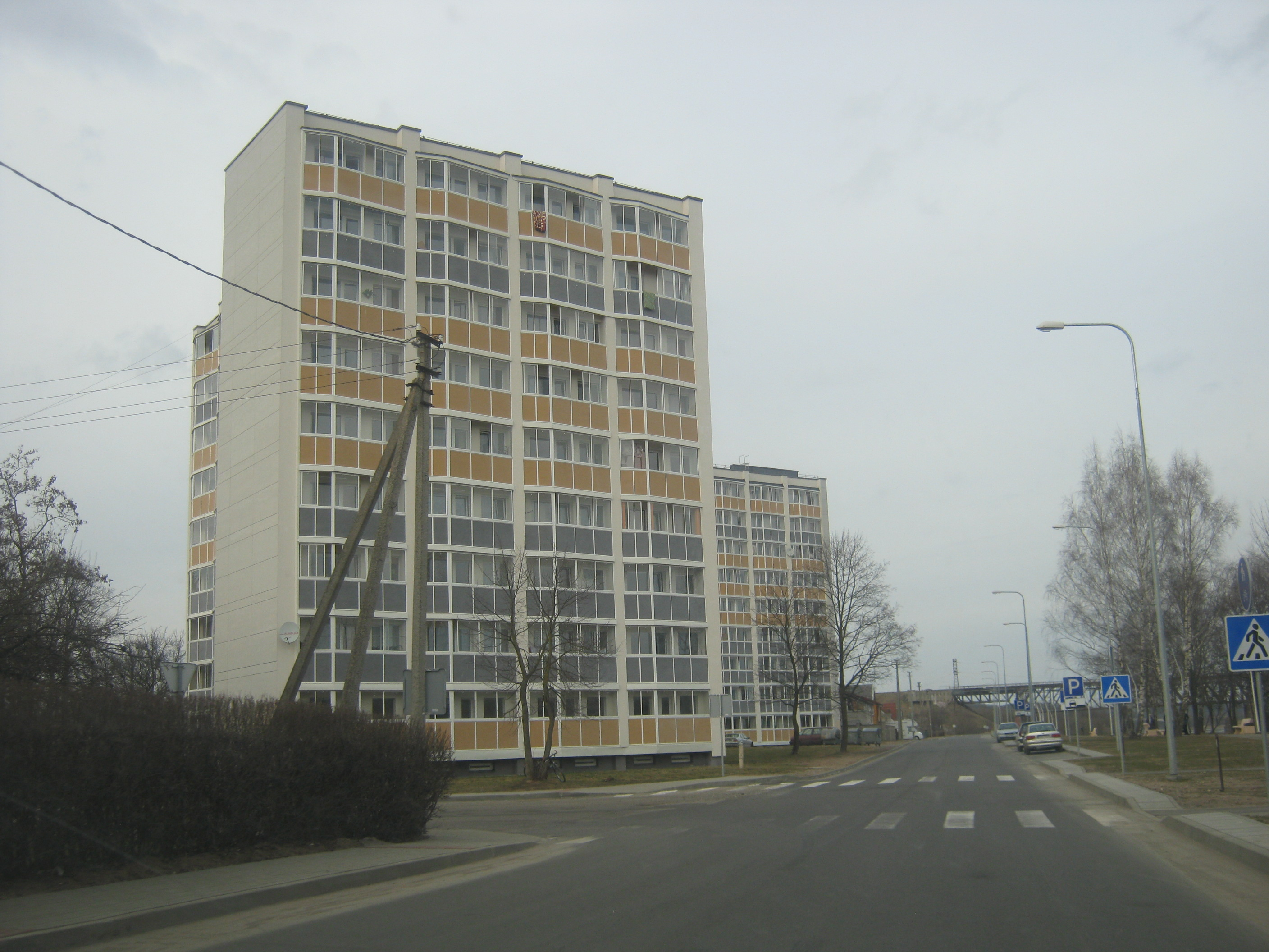 Jonava